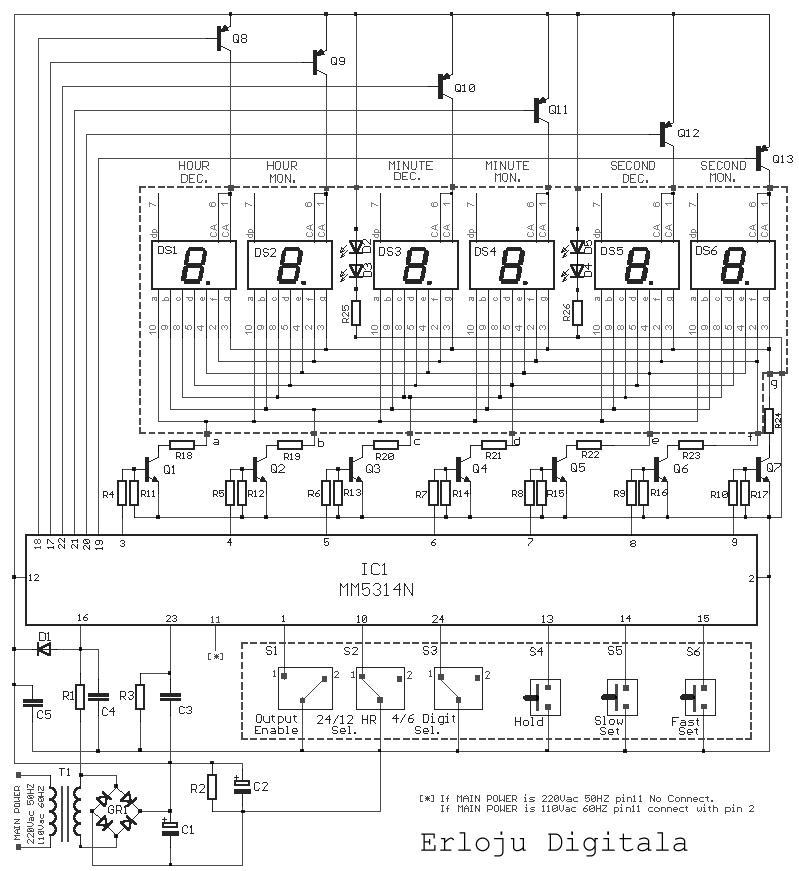 erloju conplexu baten zirkuitua